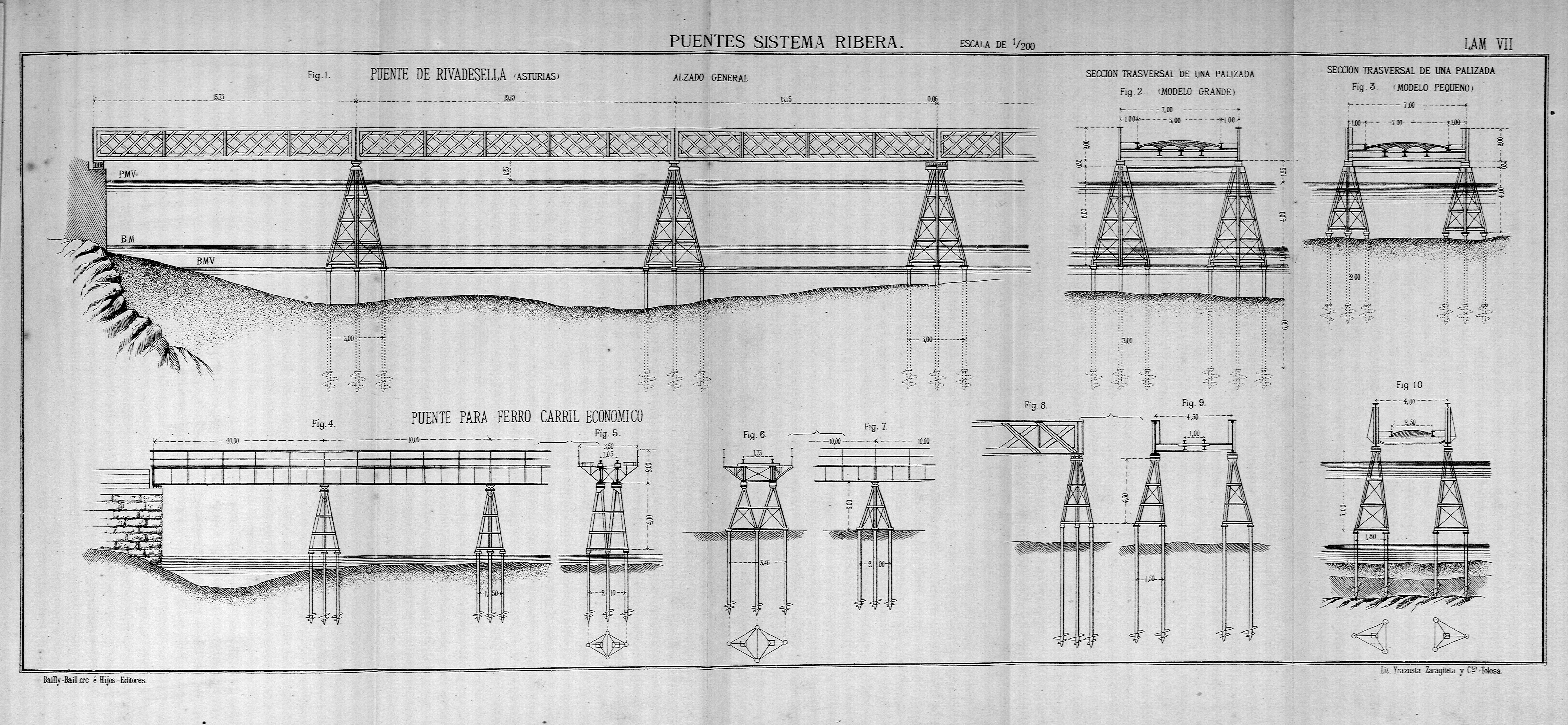 Lamina del libro Puentes de hierro económicos, muelles y faros sobre palizadas y pilotes mecánicos. Madrid: Librería Editorial de Bailly-Bailliere e Hijos.